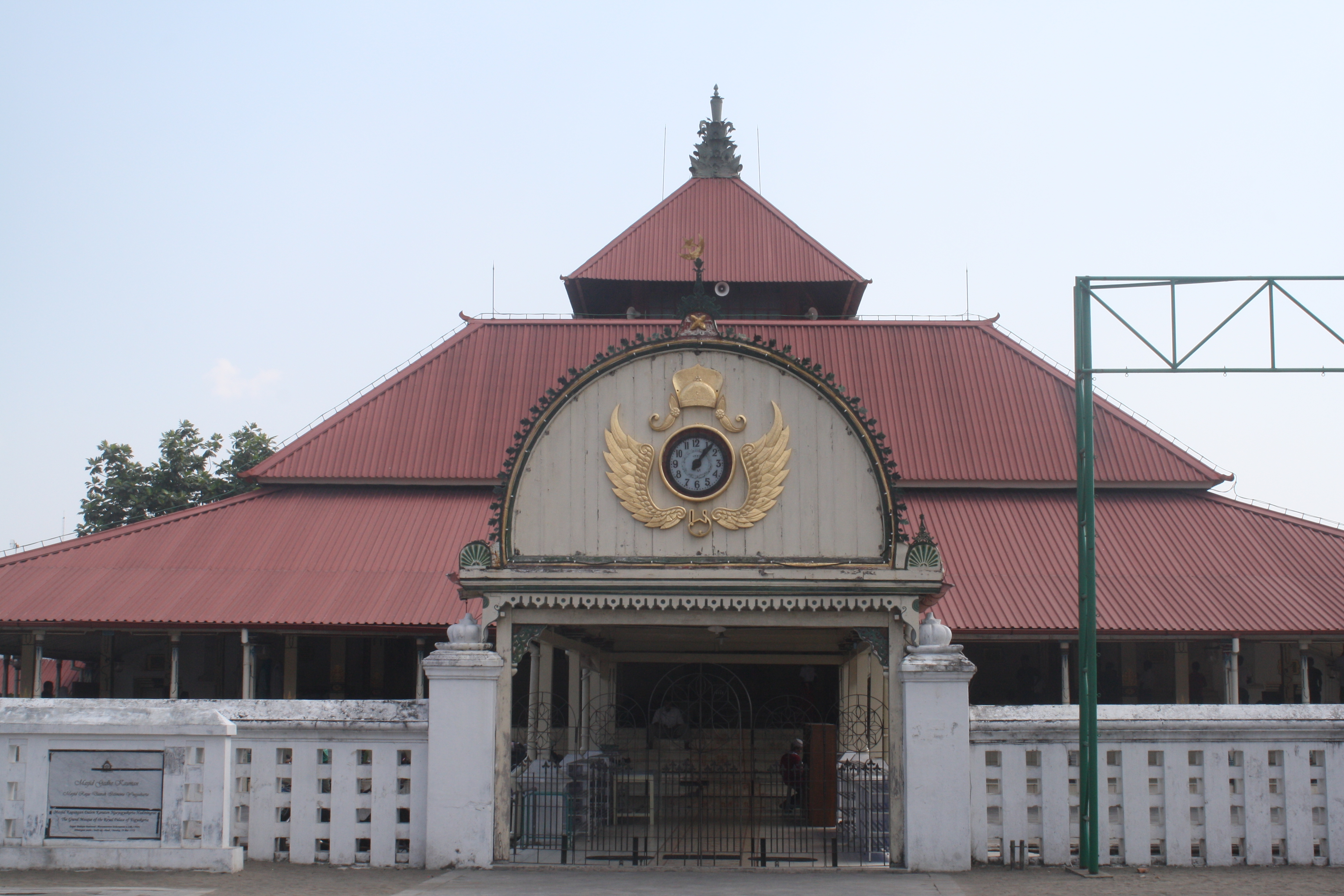 Masjid Agung dhaerah istimewa Yogyakarta Jawa Tengah Indonesia